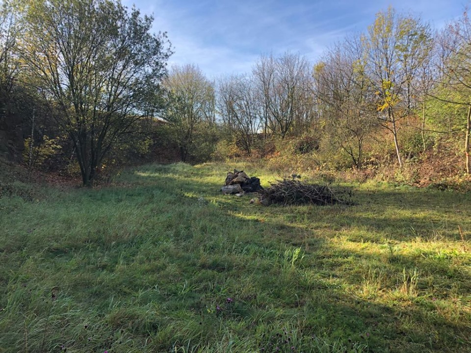 Odklizené dřevo z lomu